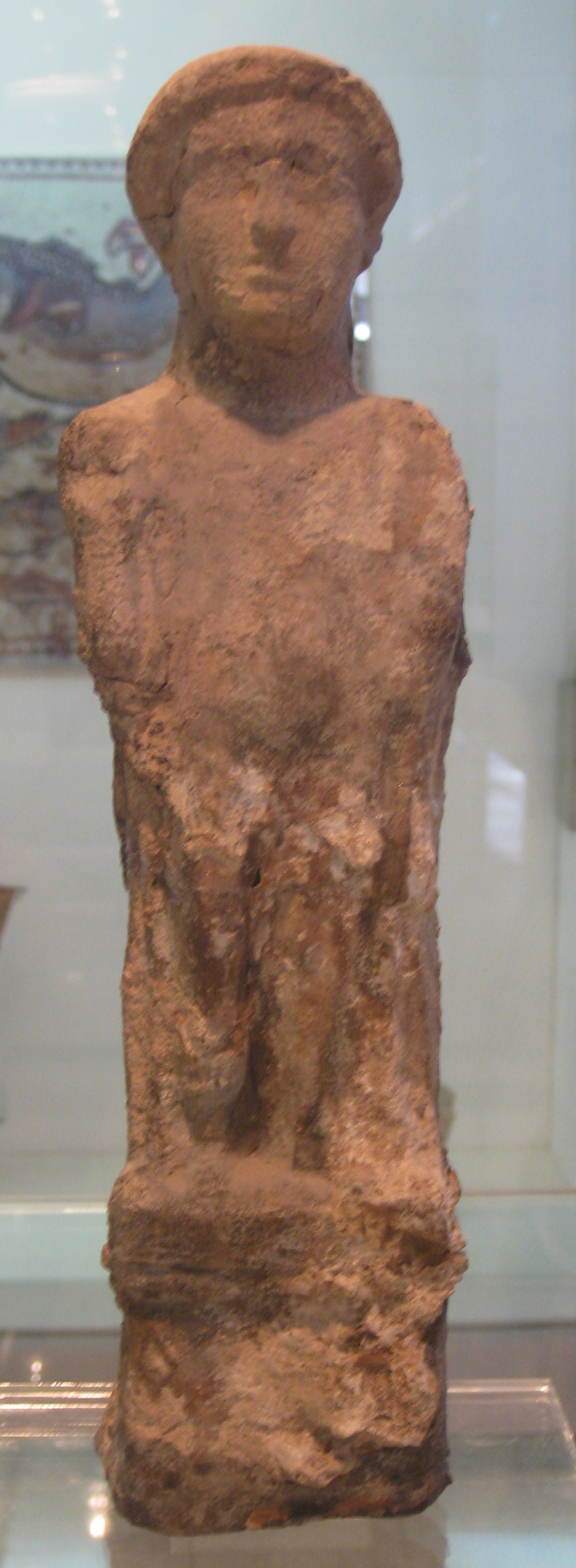 National Maritime Museum, Israel - Terracotta Figurines המוזיאון הימי הלאומי בחיפה אל מברך, צלמית אל צעיר עומדת על כן מלבני או מעוגל מרימה את ידה הימנית לאות ברכה, התקופה הפרסית מאה -5 לפנה"ס